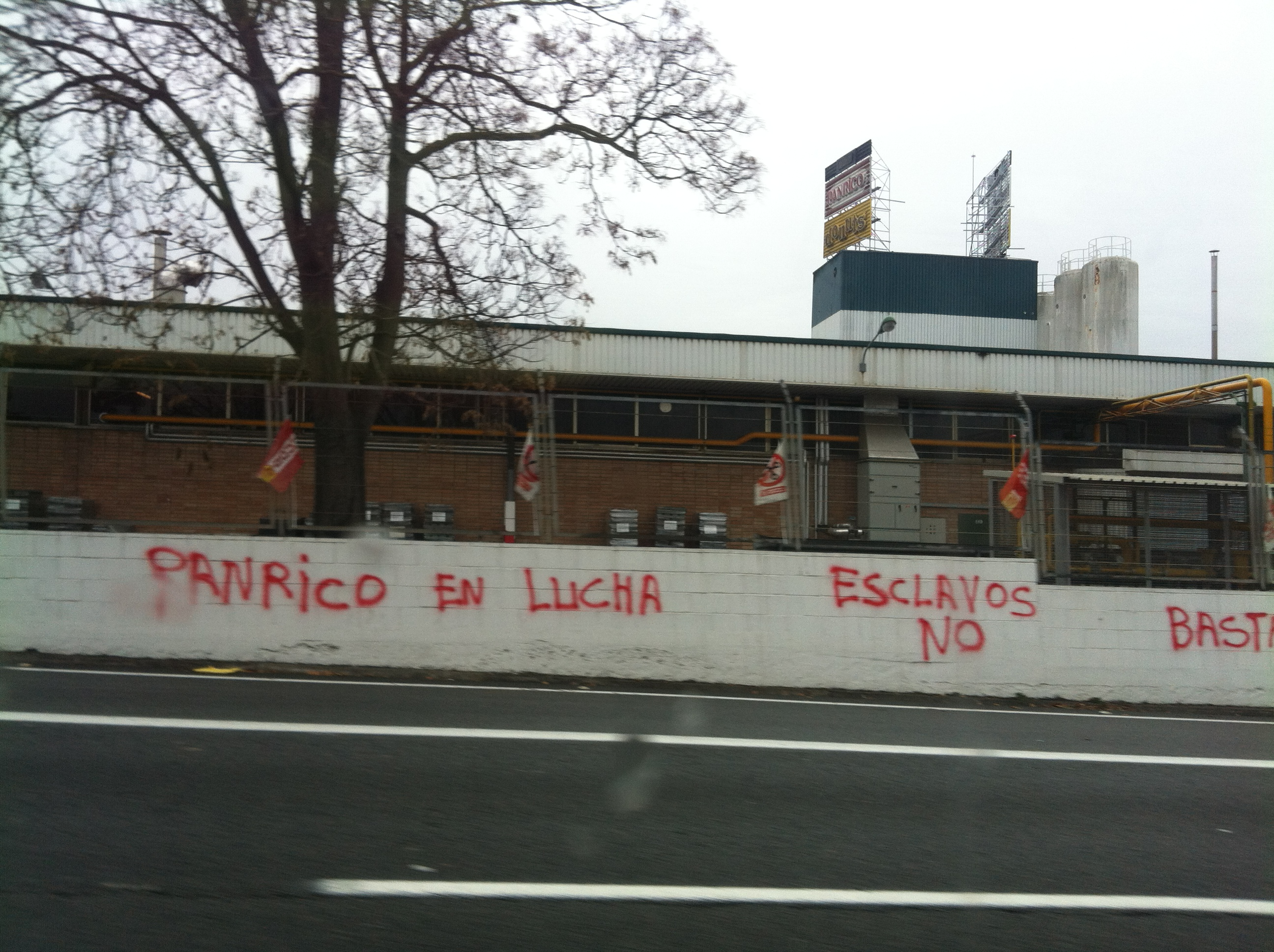 Panrico desembre 2013